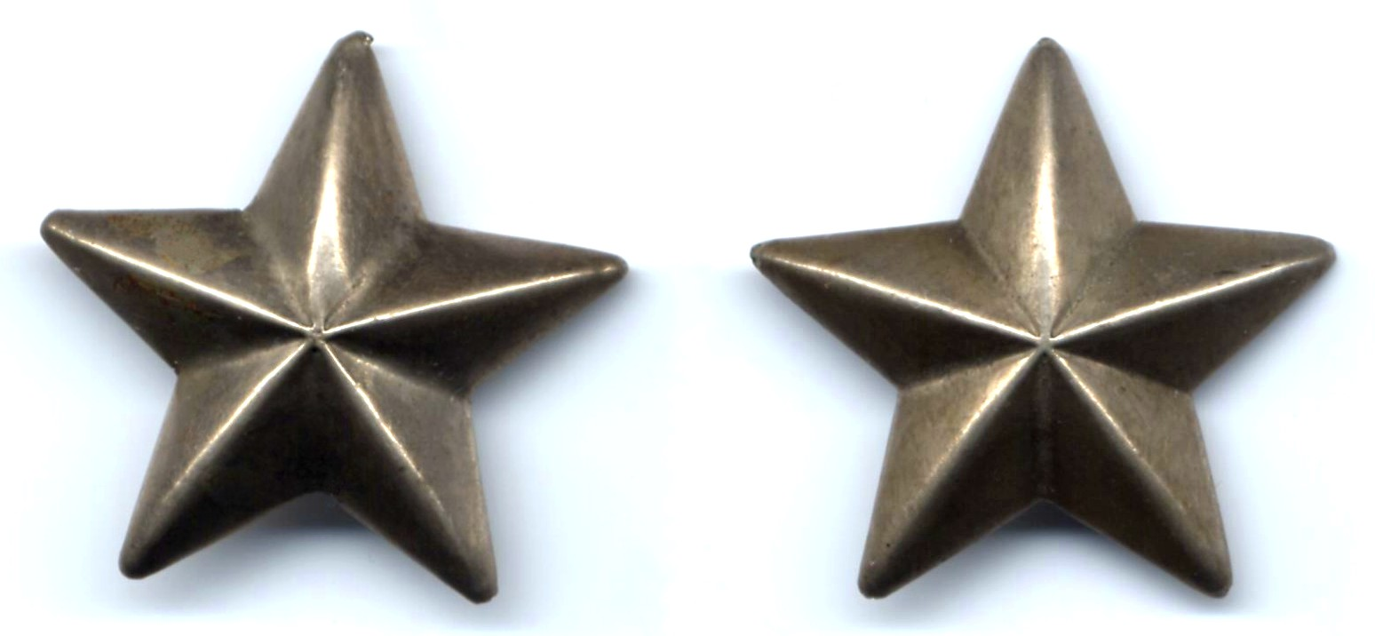 Stellette